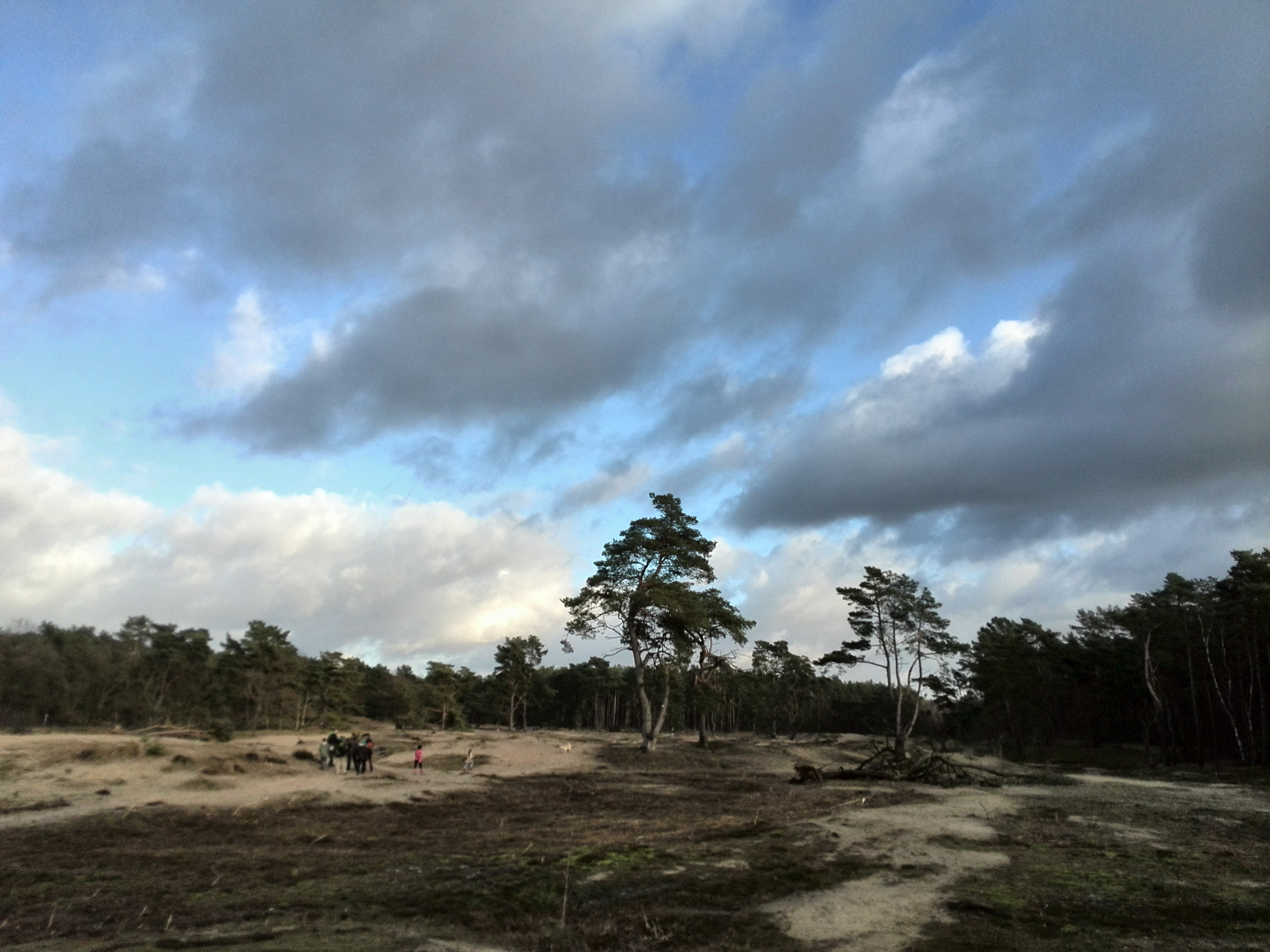 Landschaftsschutzgebiet „Holmer Sandberge“, Kreis Pinneberg, Schleswig-Holstein